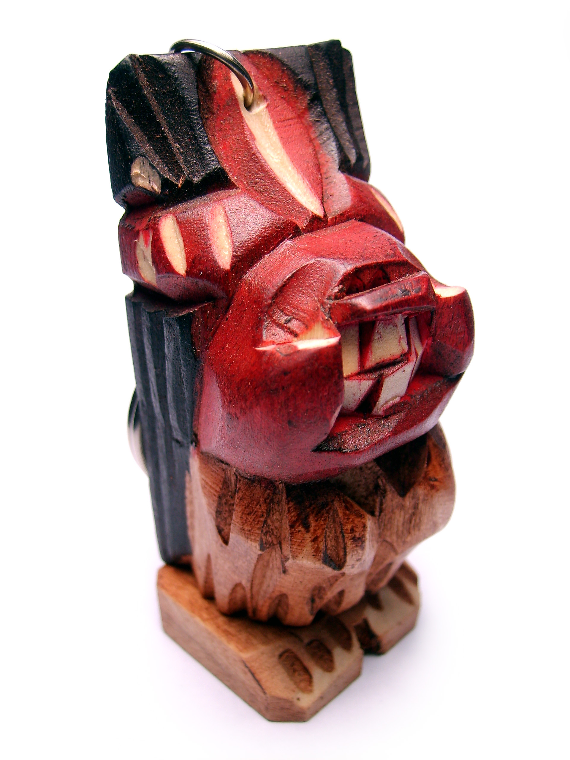 Figurilla de la India Pícara o La Guacolda, una obra tradicional de artesanía chilena. Es la versión femenina del Indio Pícaro.